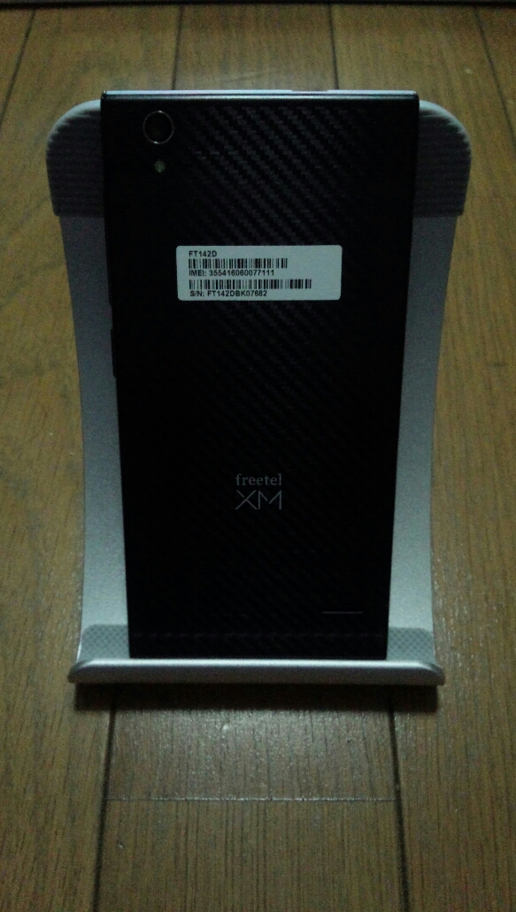 携帯端末の背面(ブランド・型番等表記あり)